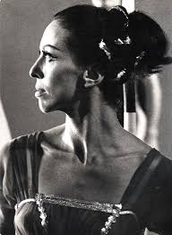 מתוך היצירה "בבואות", 1967; כוראוגרפיה: רינה גלוק, סט: דני קרוון (באדיבות להקת מחול בת-שבע)